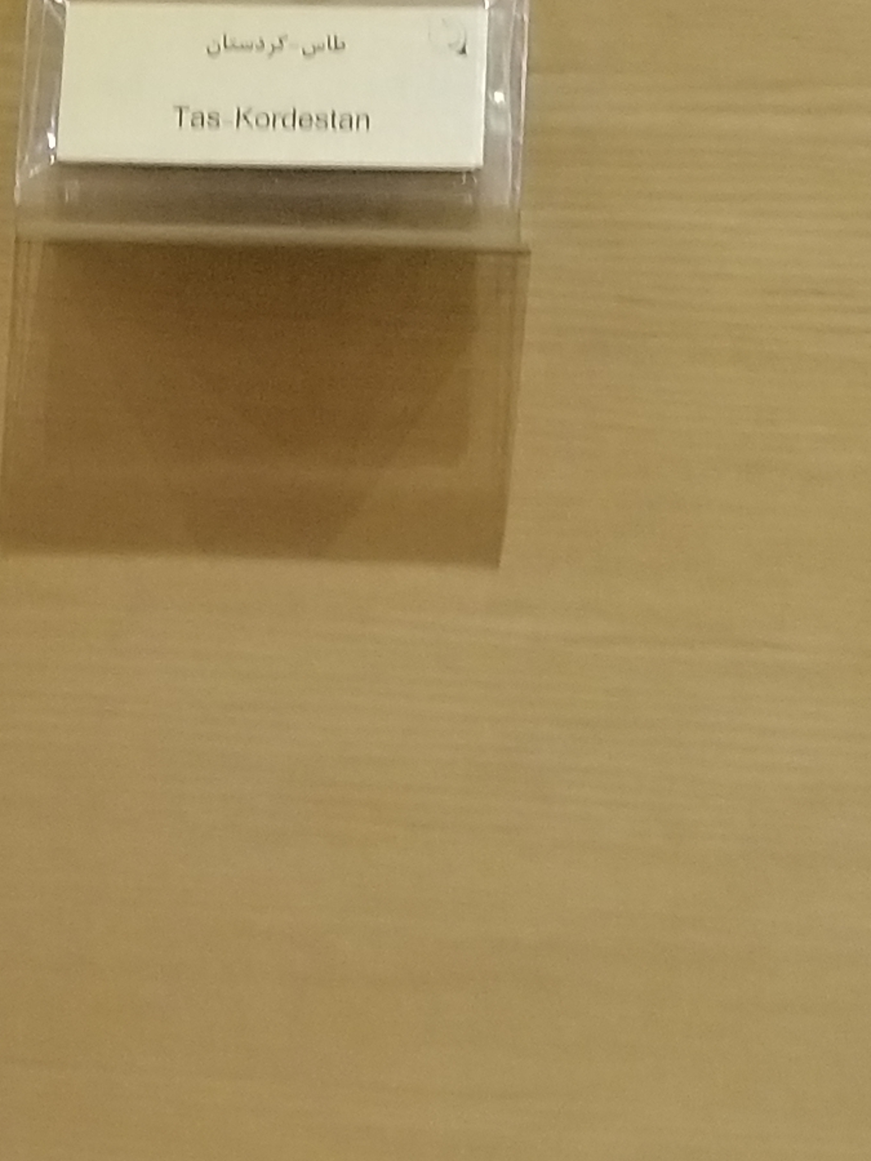 کوردی: نووسراوەی ژێر تاسێک لە مۆزەخانەی مۆسیقای ئێران، نووسراوە: تاس، کوردستان